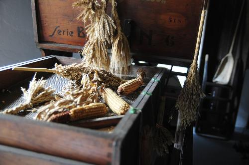 Museo della civiltà contadina di Bastiglia (Italia)